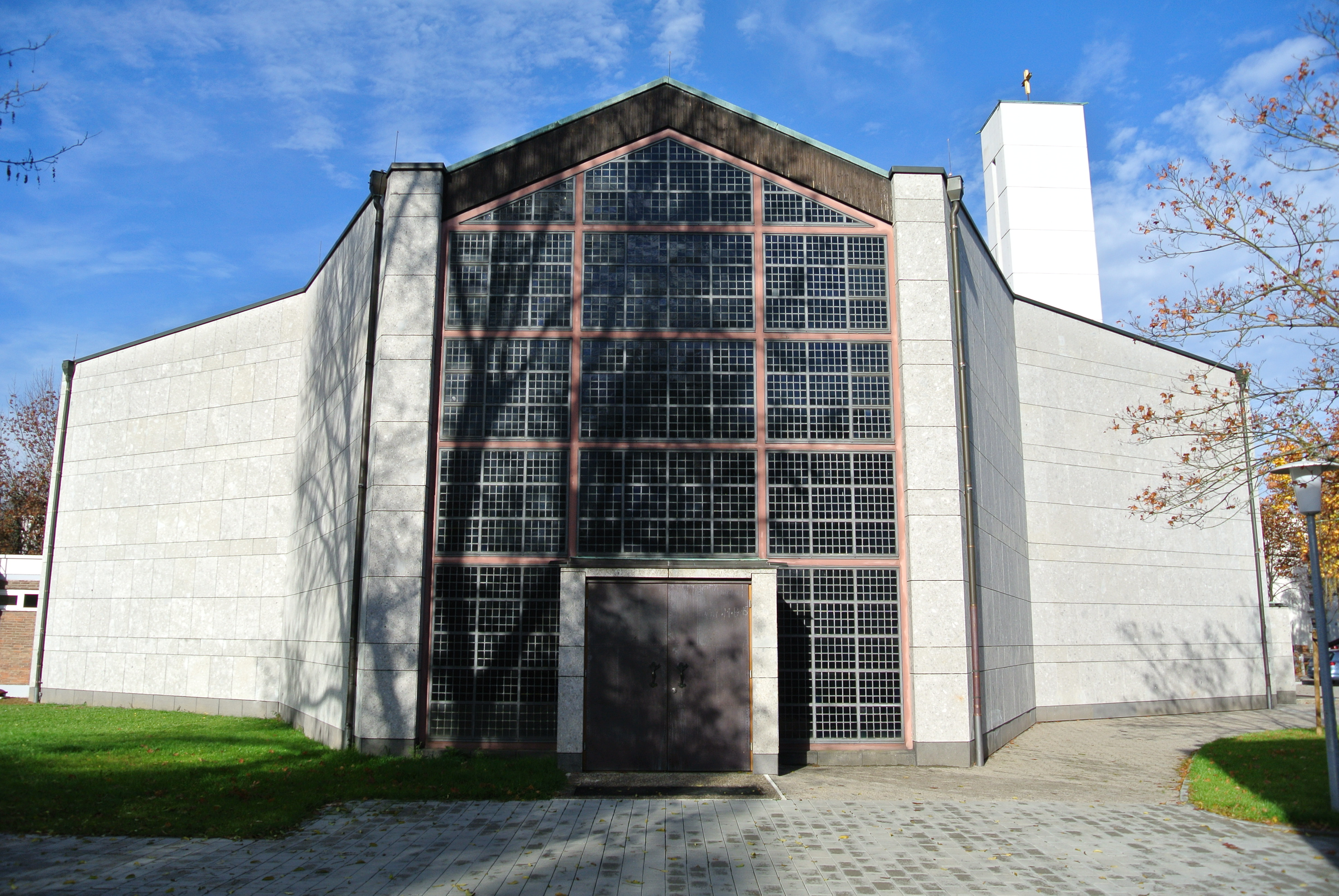 Katholische Sankt Anna Kirche in Frankfurt am Main (Hausen), moderner Kirchenbau aus dem Jahr 1968 der Architekten Hermann Mäckler und Alois Giefer, Südansicht